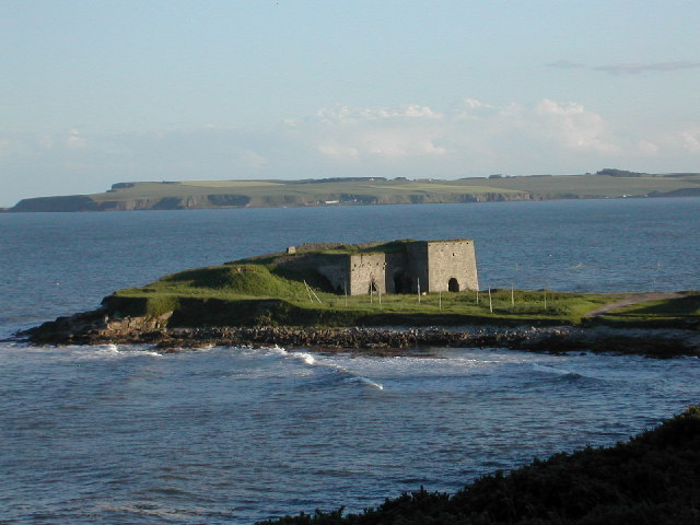 Lime kilns at Boddin Point, Angus